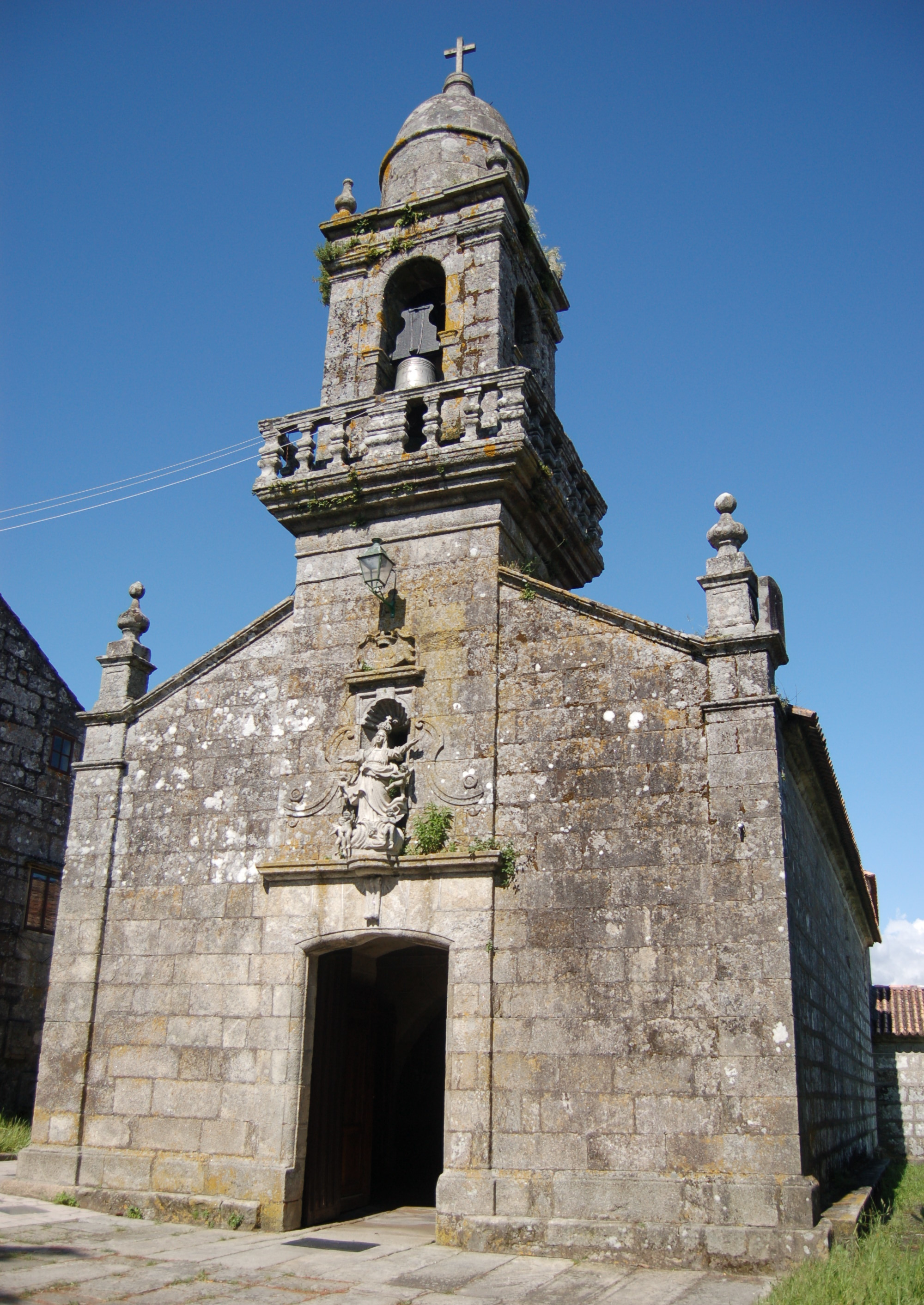 Igrexa parroquial de Santa María do Viso (Redondela)